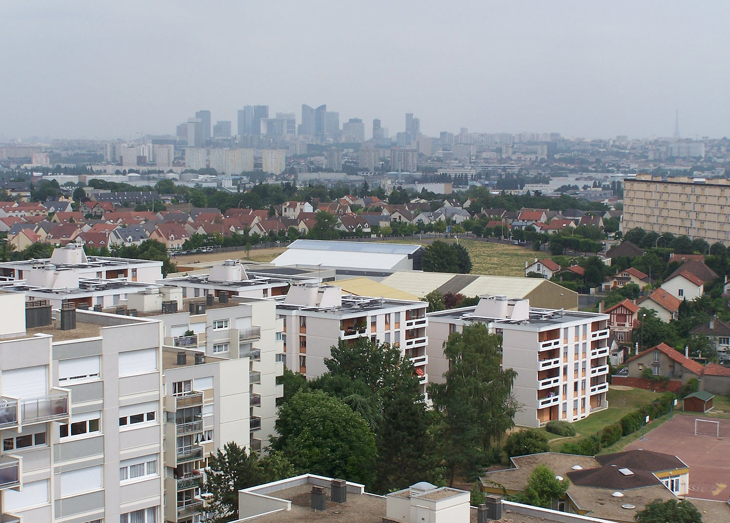 Vue sur Paris des Hauts de Chatou